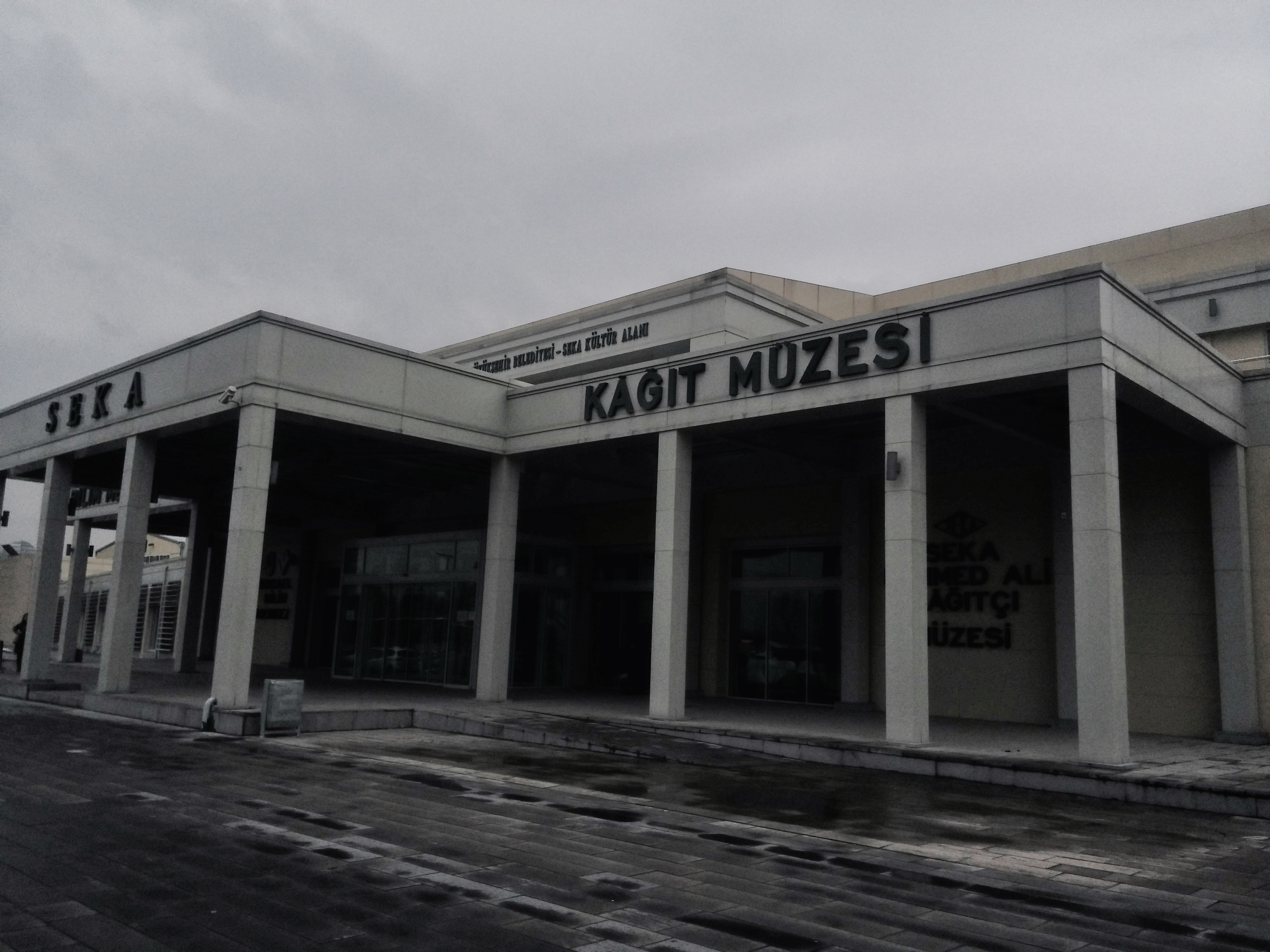 Kocaeli'nin İzmit ilçesindeki SEKA Kağıt Müzesinin girişi.